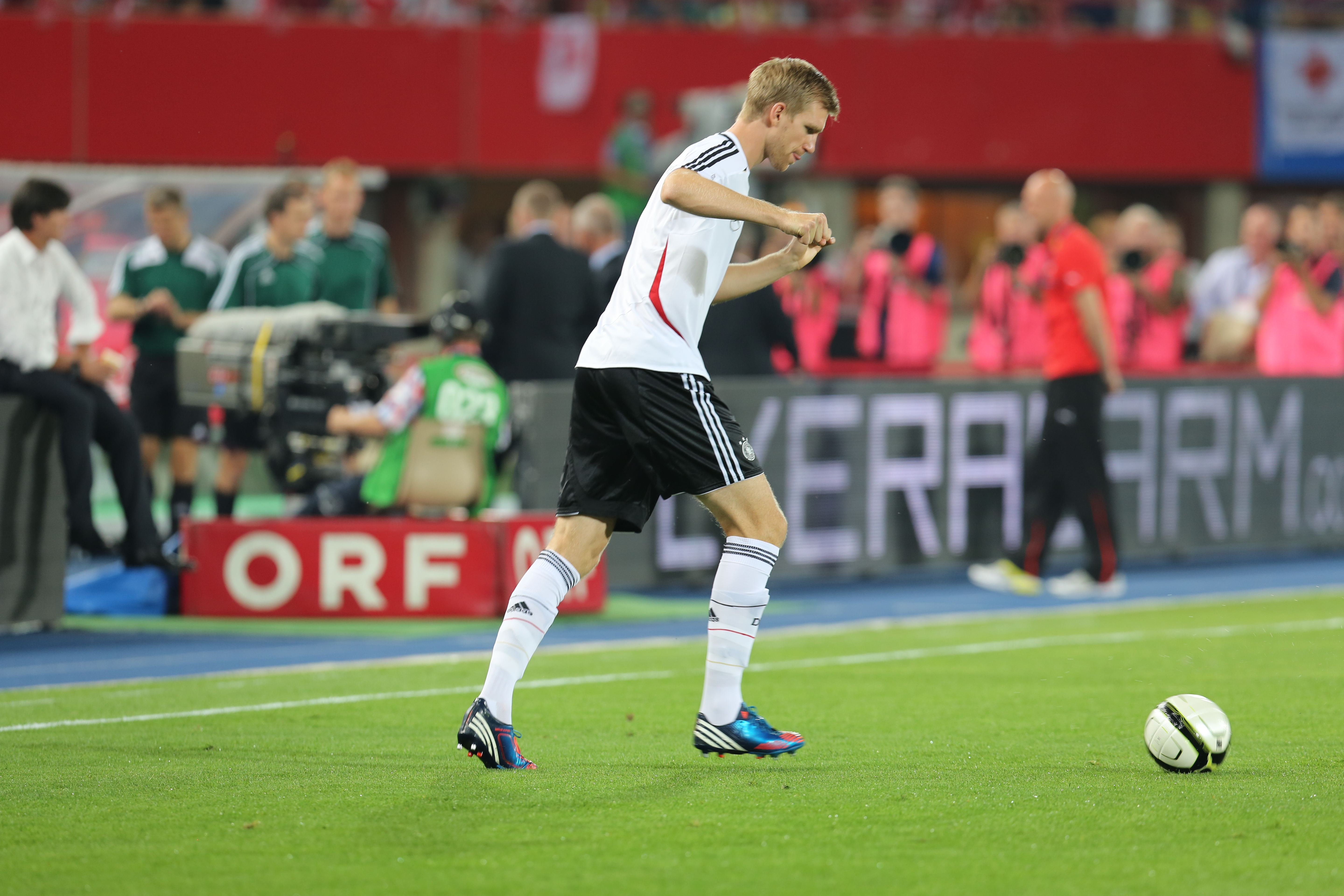 Fußball-Weltmeisterschaft 2014/Qualifikation (UEFA), Gruppe C, 11. September 2012, Österreich gegen Deutschland im Wiener Ernst-Happel-Stadion. The making of this work was supported by Wikimedia Austria. For other files made with the support of Wikimedia Austria, please see the category Supported by Wikimedia Österreich.